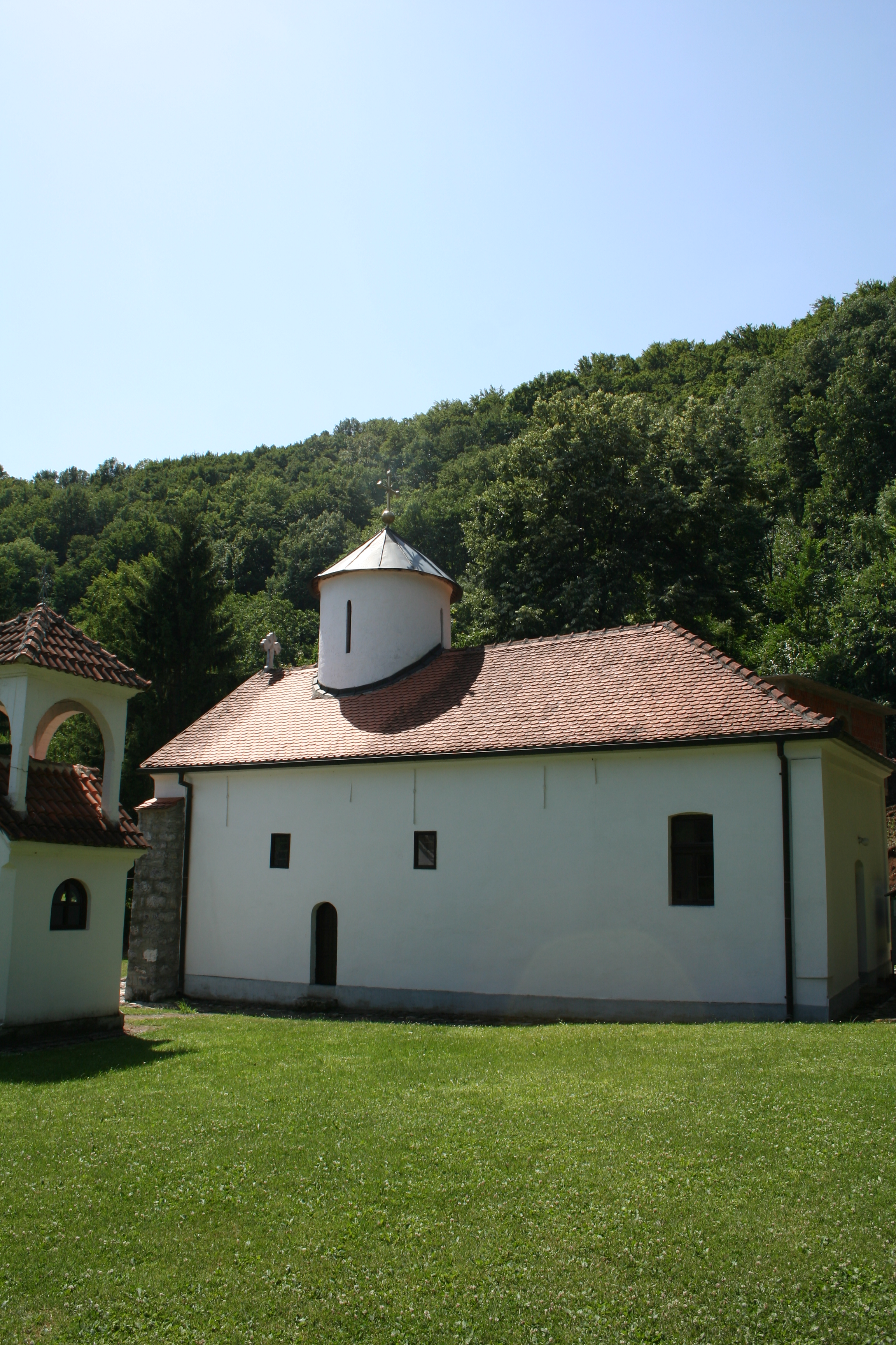 Crkva Sv. Nikole, Krčmar